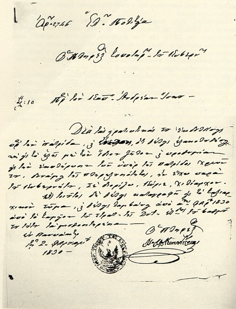 Αυθεντικό κείμενο προαγωγής του Αντρέα Ίσκου σε χιλίαρχο